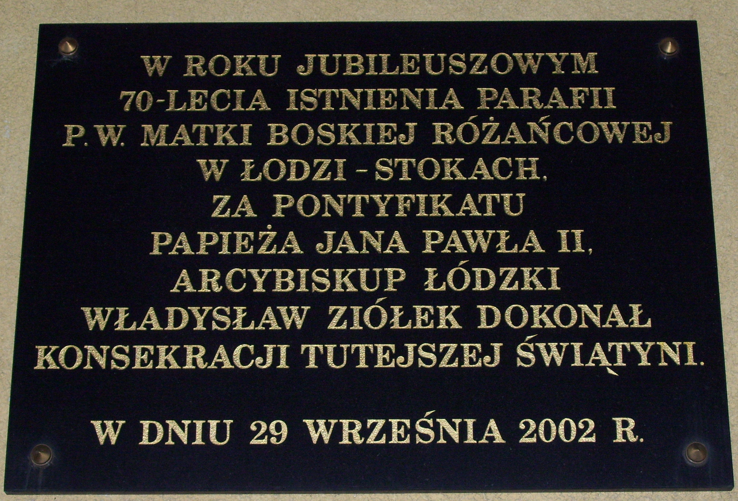 Tablica Lodz Stoki Konsekracja